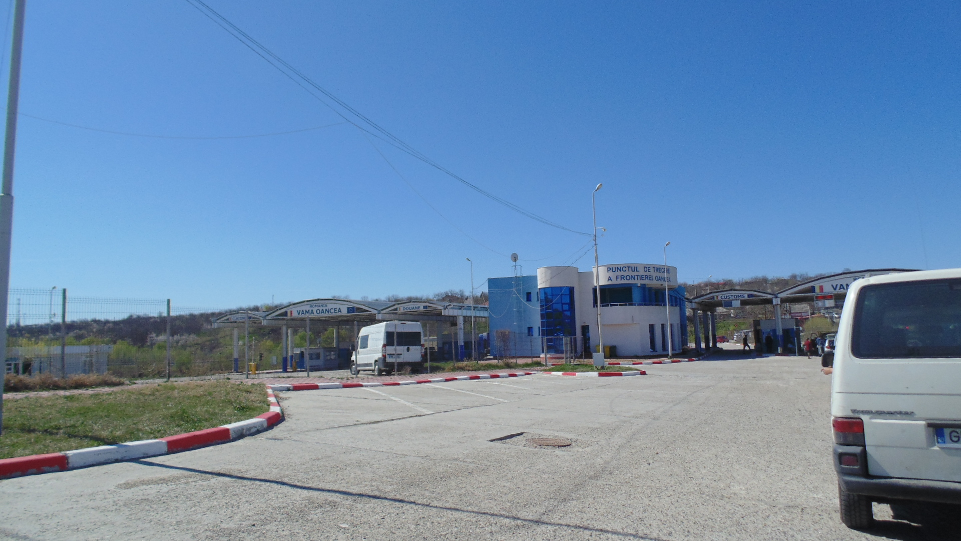 Граничният пункт при Оанча на влизане в Румъния Romani: Vama Oancea